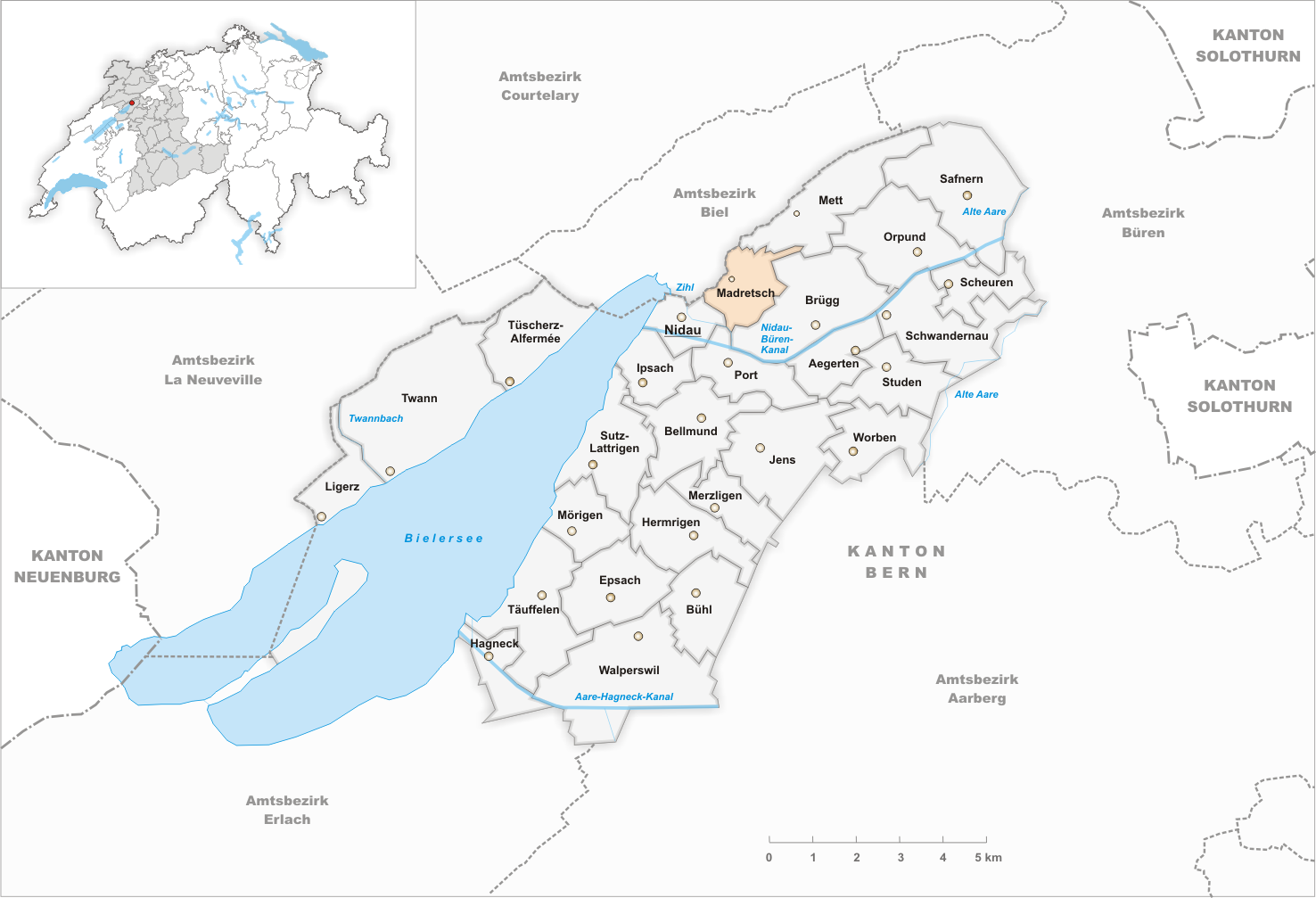 Municipality Madretsch